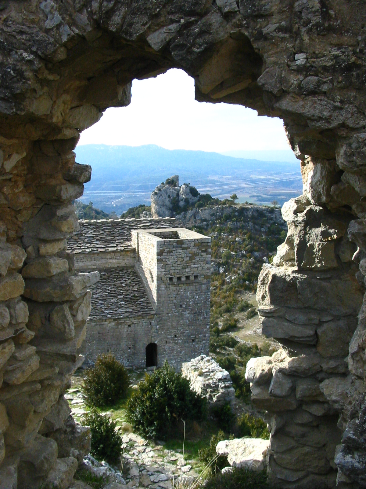 Samitier, A Fueba, Uesca, Aragón.